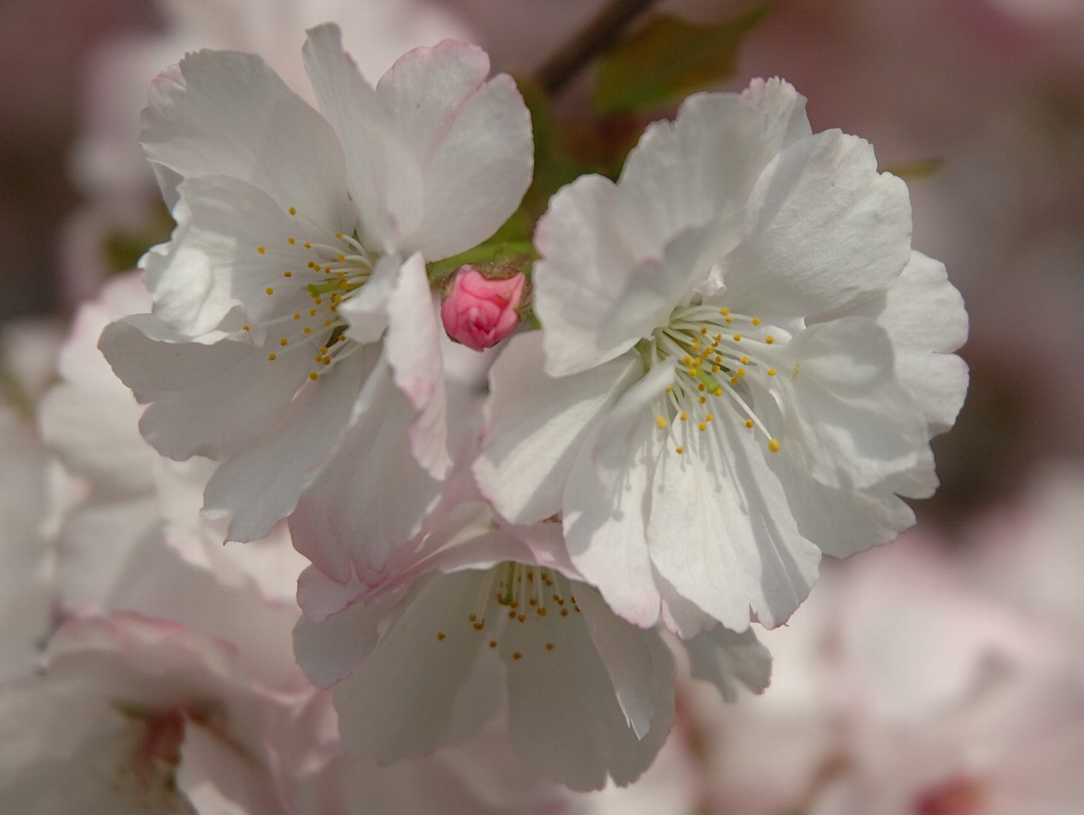 Prunus serrulata (サクラ)